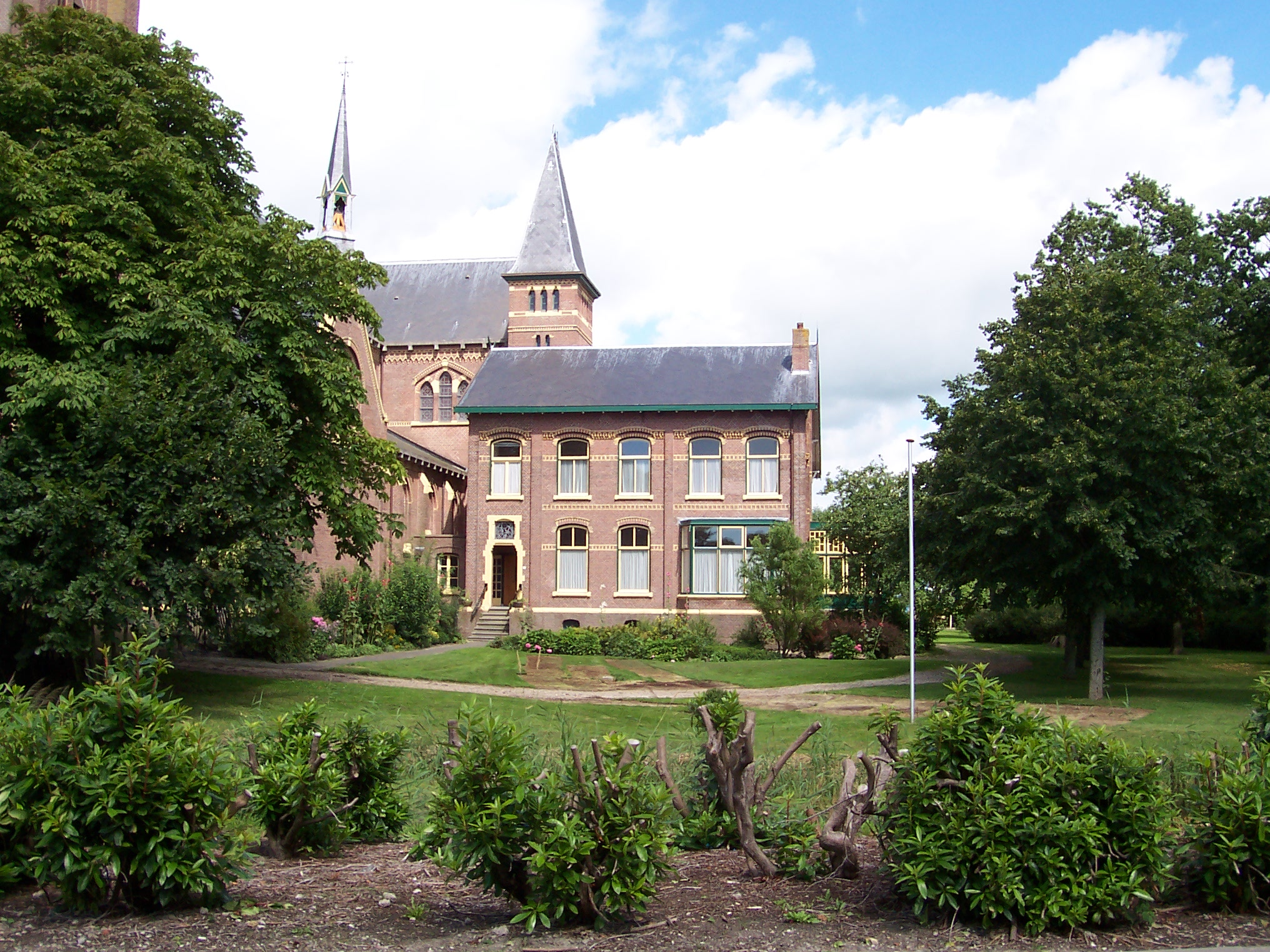 Blauhûs: Pastorije Sint-Fitustsjerke